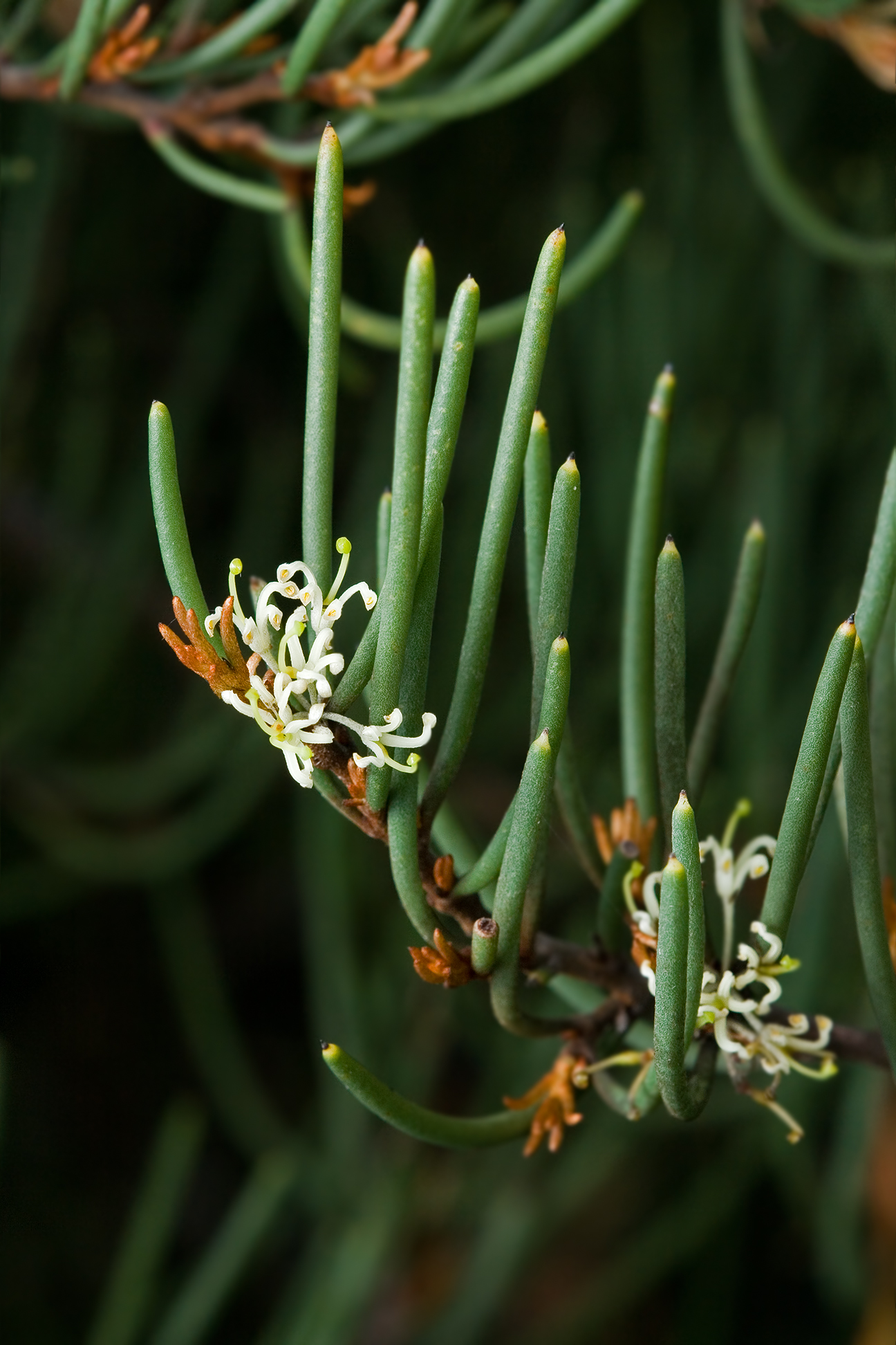 Hakea epiglottis, Cape Raoul, Tasman Peninsula, Tasmania, Australia